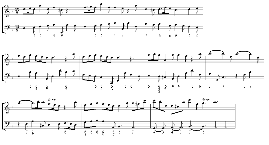 Aus: Georg Friedrich Händel, Sonate für Blockflöte und Basso Continuo, Op. 1 No. 11, 3. Satz